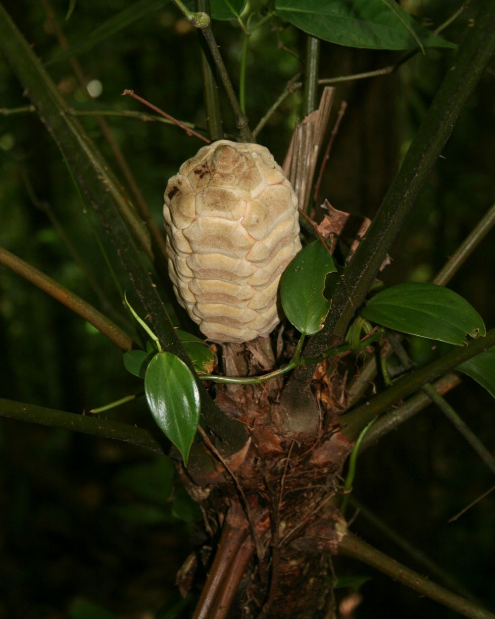 Zamia fairchildiana, Zamiaceae - Costa Rica: Prov. Puntarenas, La Gamba NW Golfito, "Fila Trail" W "Esquinas Rainforest Lodge"